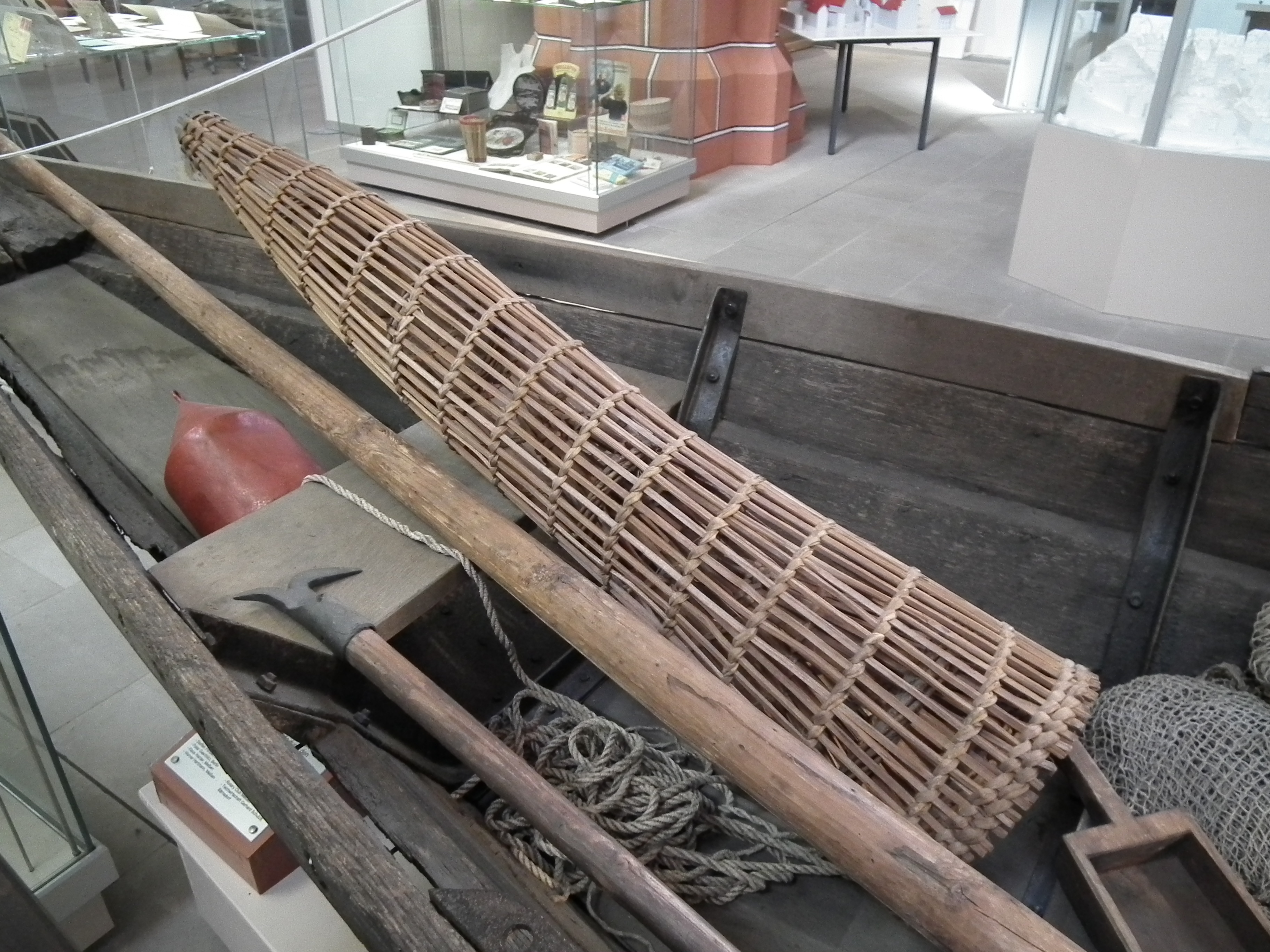 Stadtmuseum Meißen Ausstellung